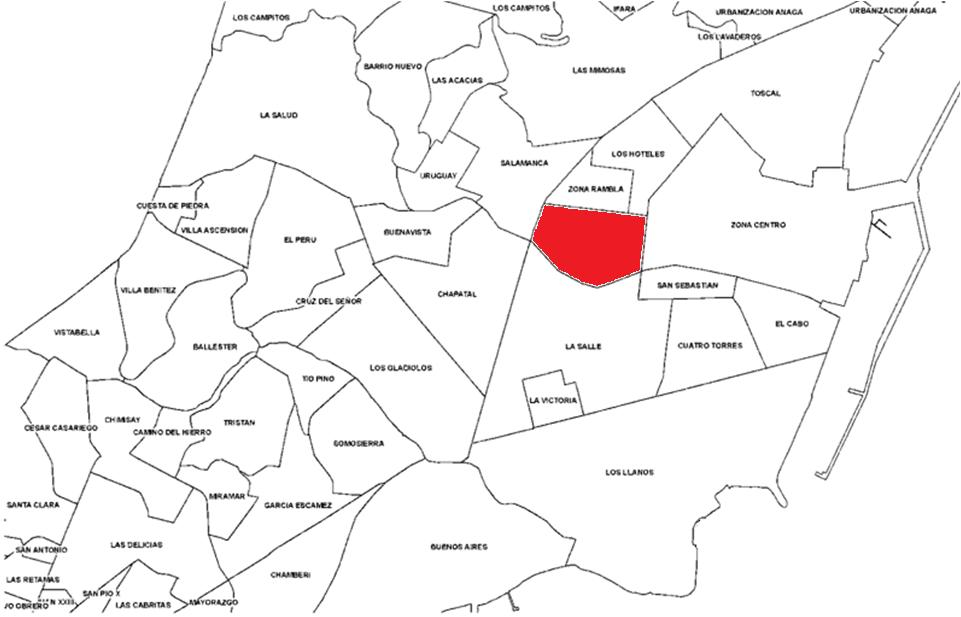 Localización del barrio